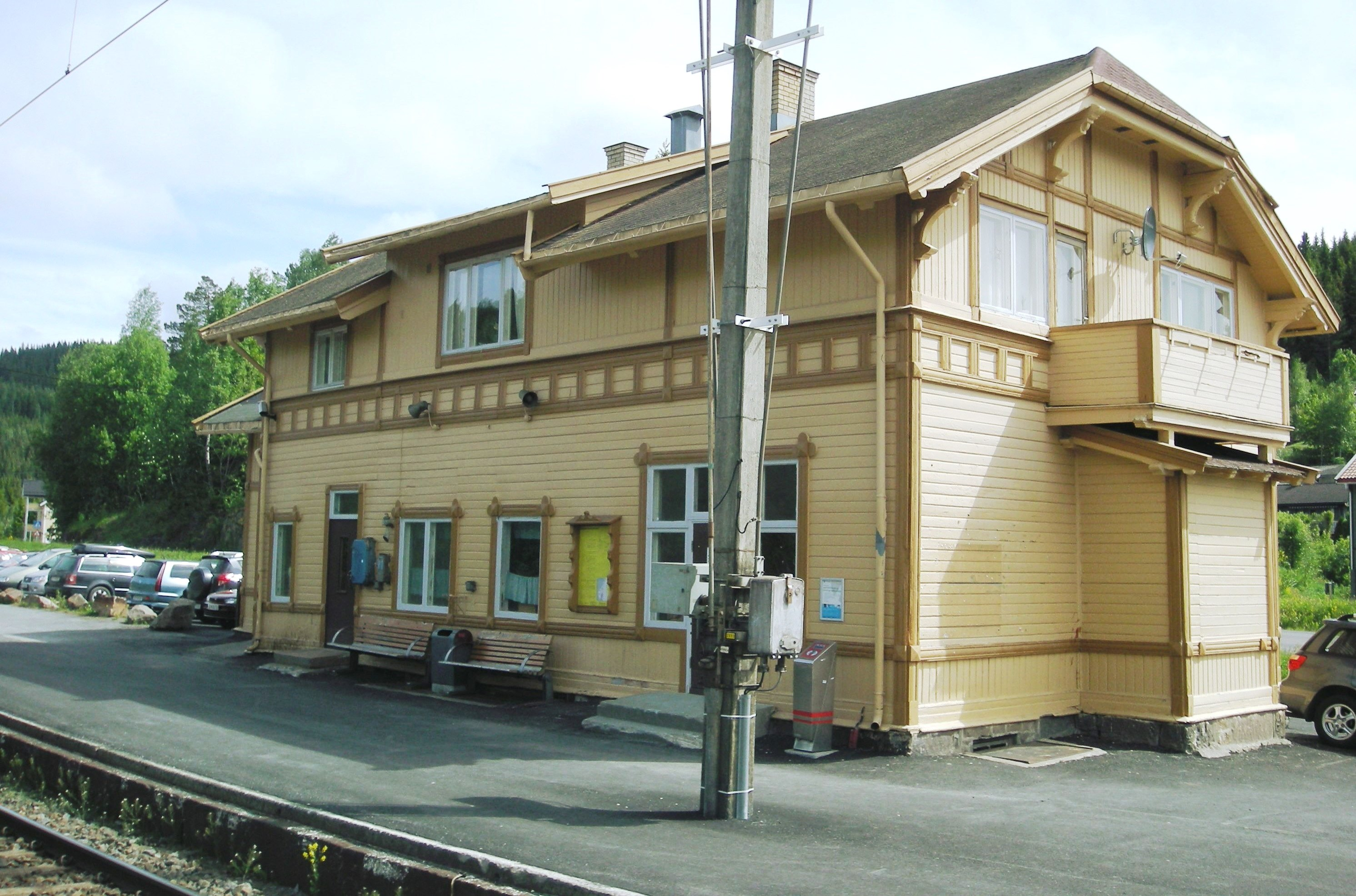 Grua stasjon anno 2009